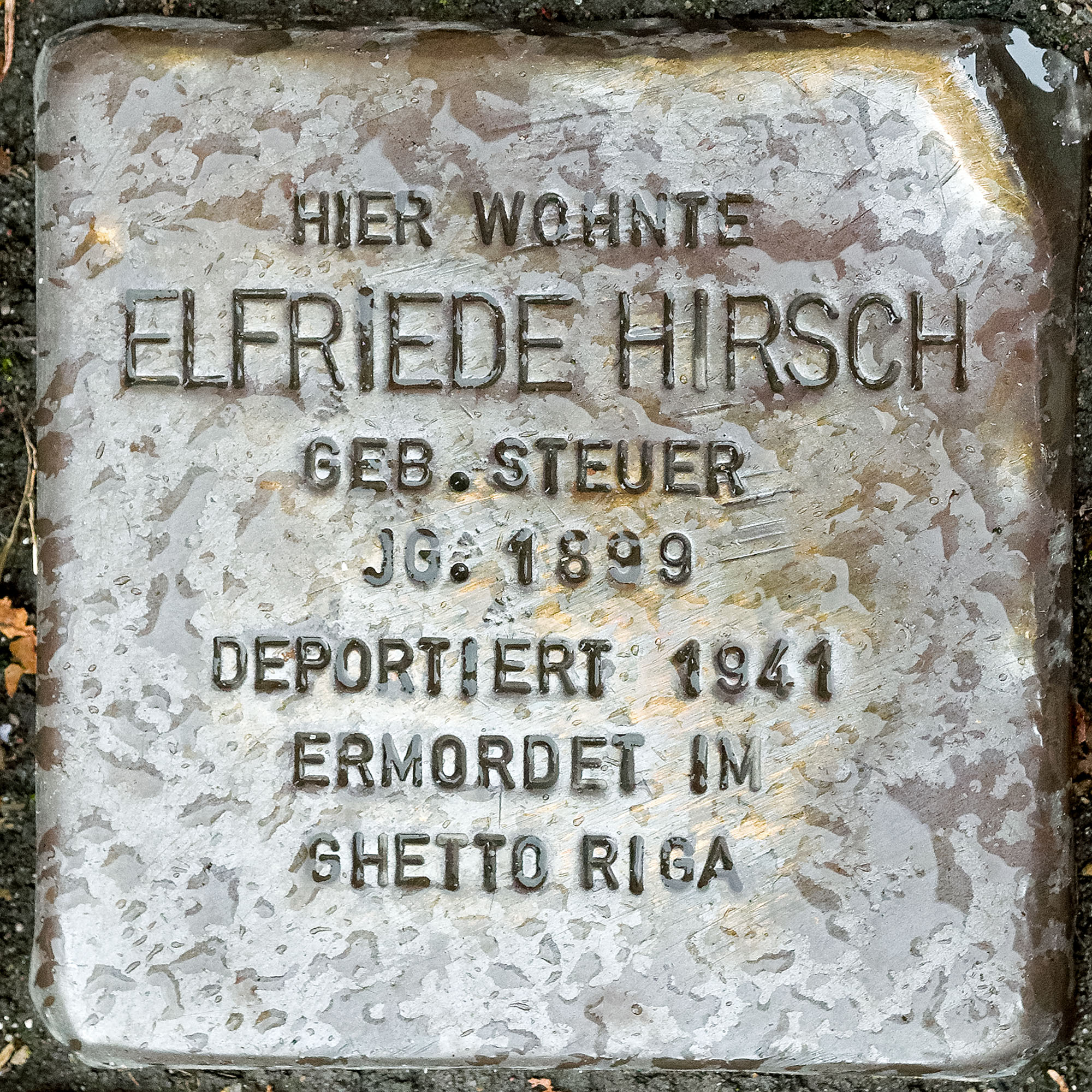 Stolpersteine in Viersen: Hirsch, Elfriede